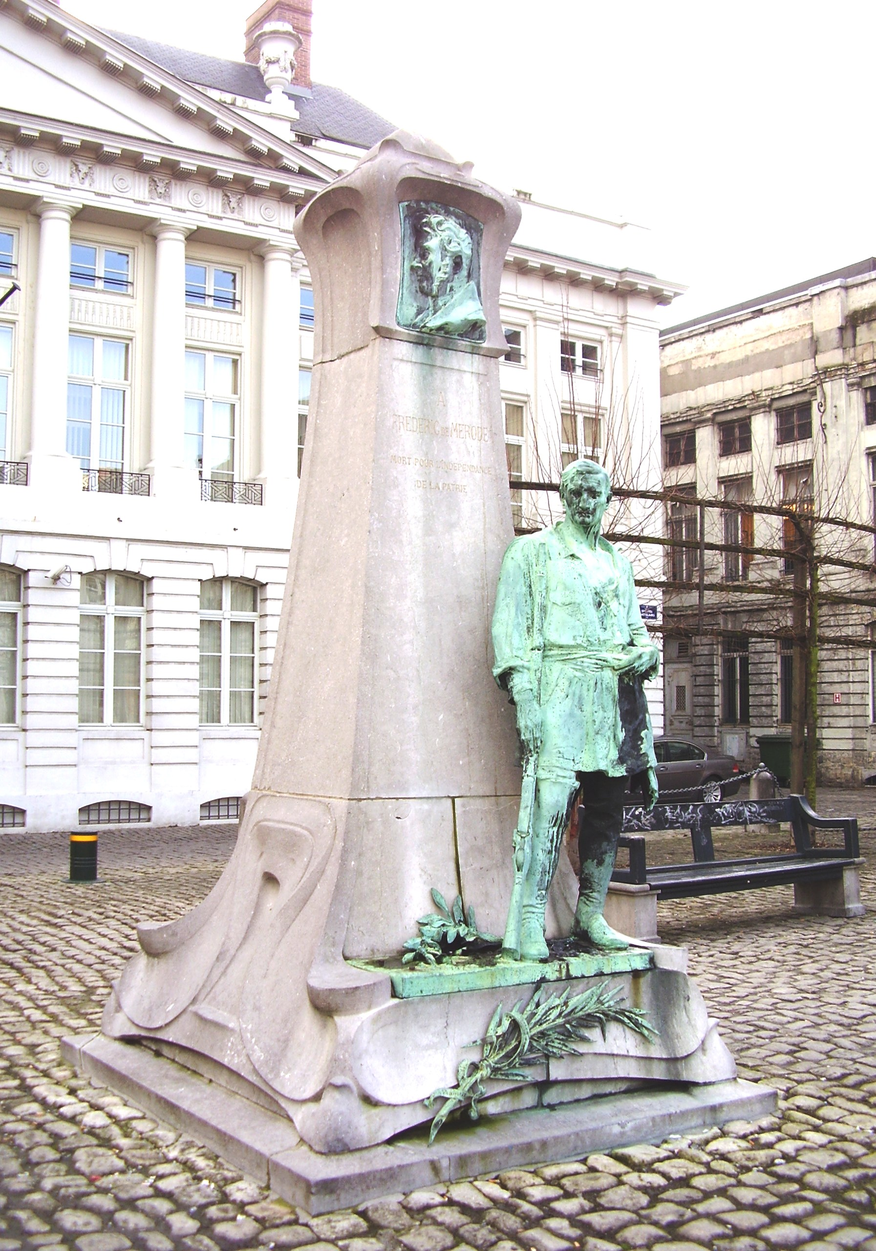 Monument Frédéric de Mérode, Place des Martyrs - Bruxelles (architecte: Henry van de Velde - sculpteur:Paul Du Bois)